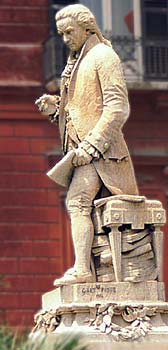 Bari - Monumento a Niccolò Piccinni - Corso Vittorio Emanuele